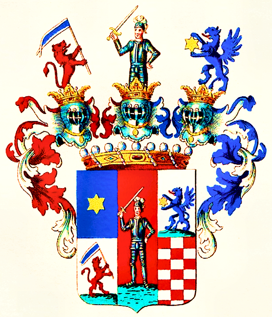 Wappen der Grafen von Harbuval von 1751 nach Tyroff